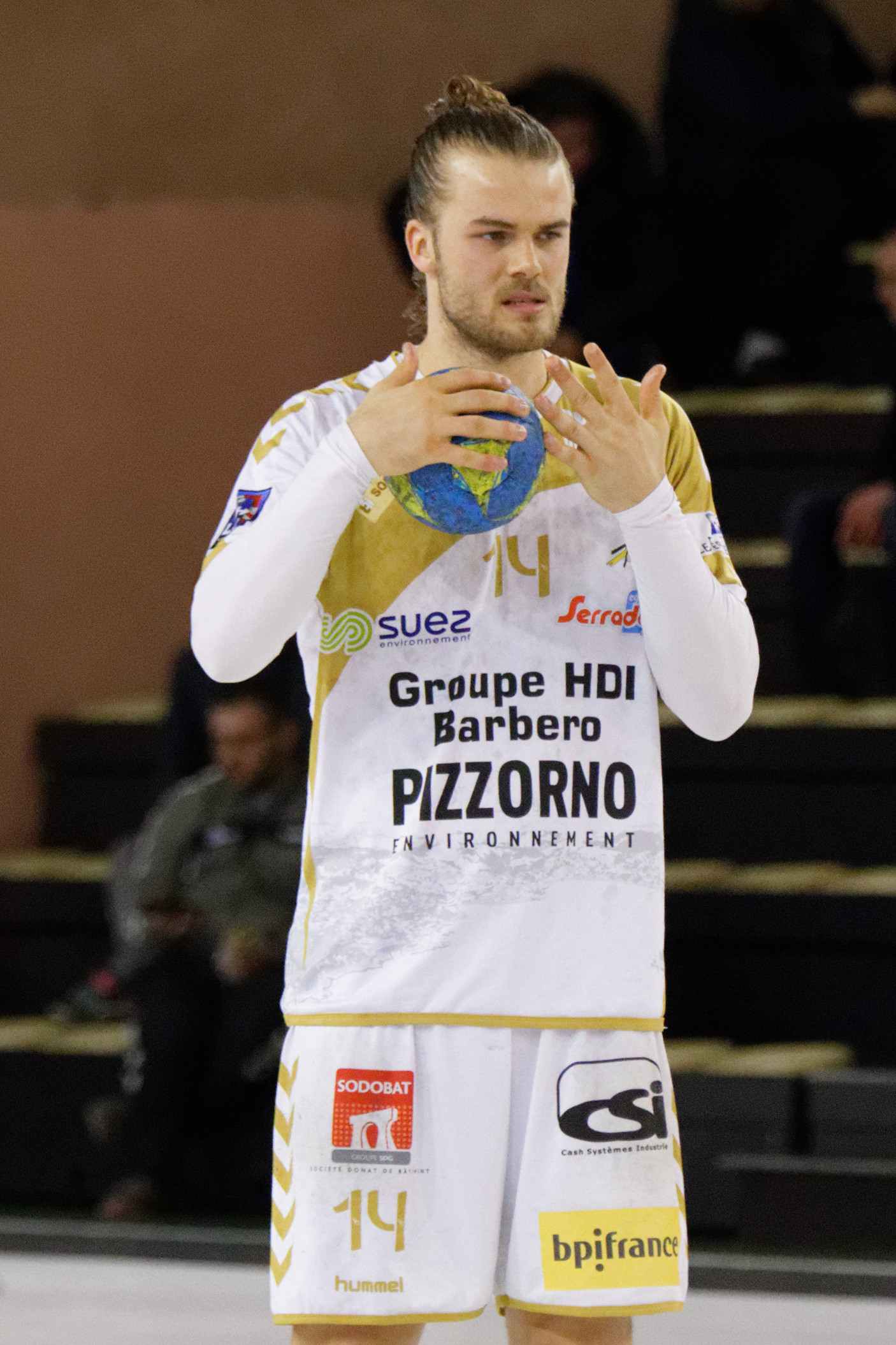 Ivry - Saint-Raphaël lors de la 19e journée du championnat de France de handball masculin le 23 mars 2016 au gymnase Auguste Delaune à Ivry sur Seine.